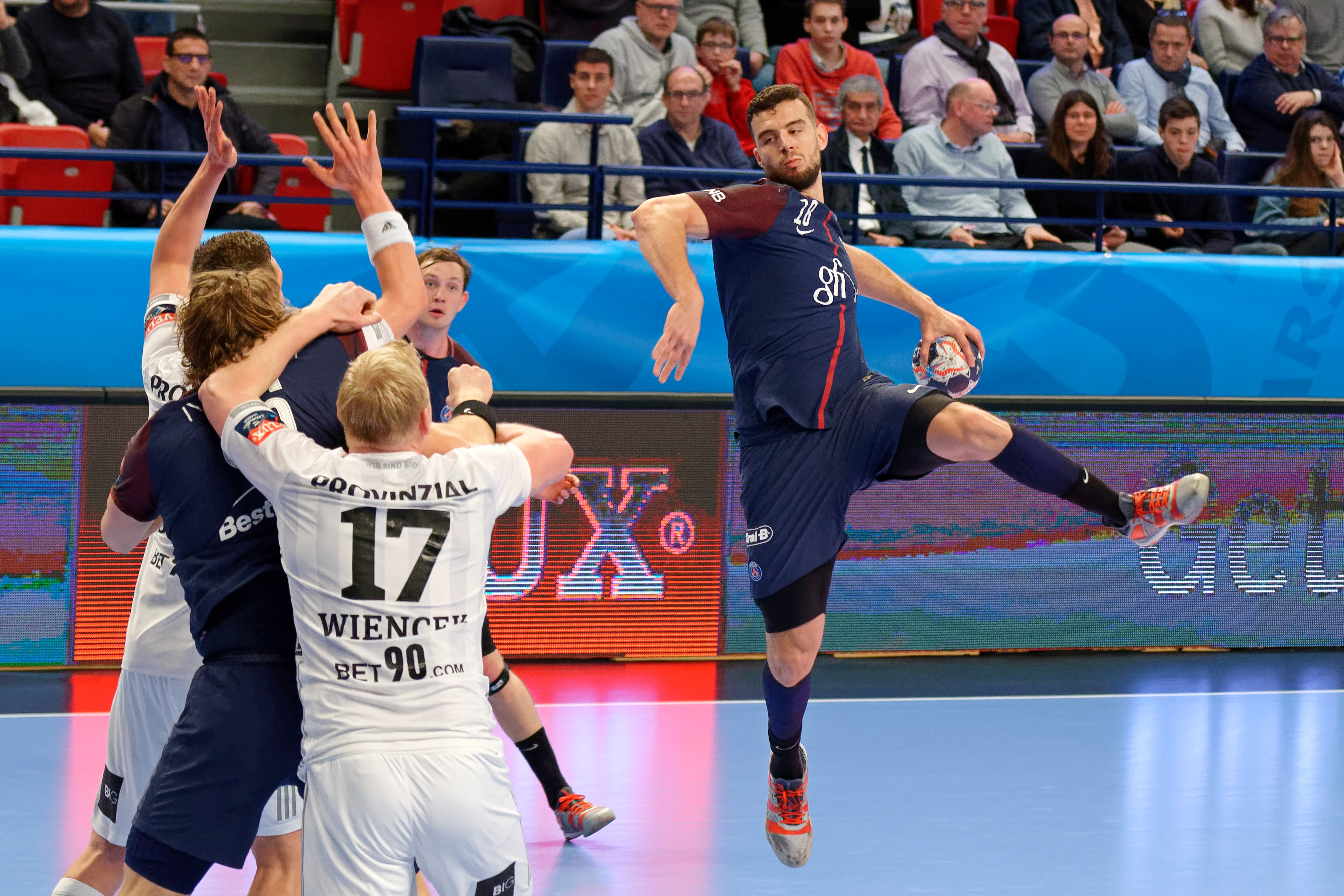 Match entre le PSG Handball et Kiel. A Coubertin, le 04 mars 2018.